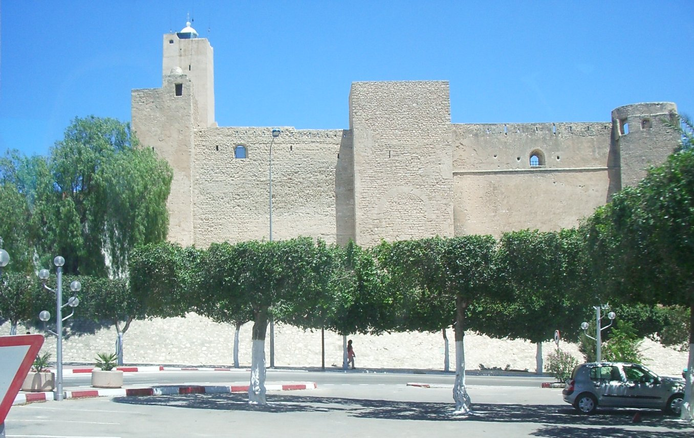 Sussa